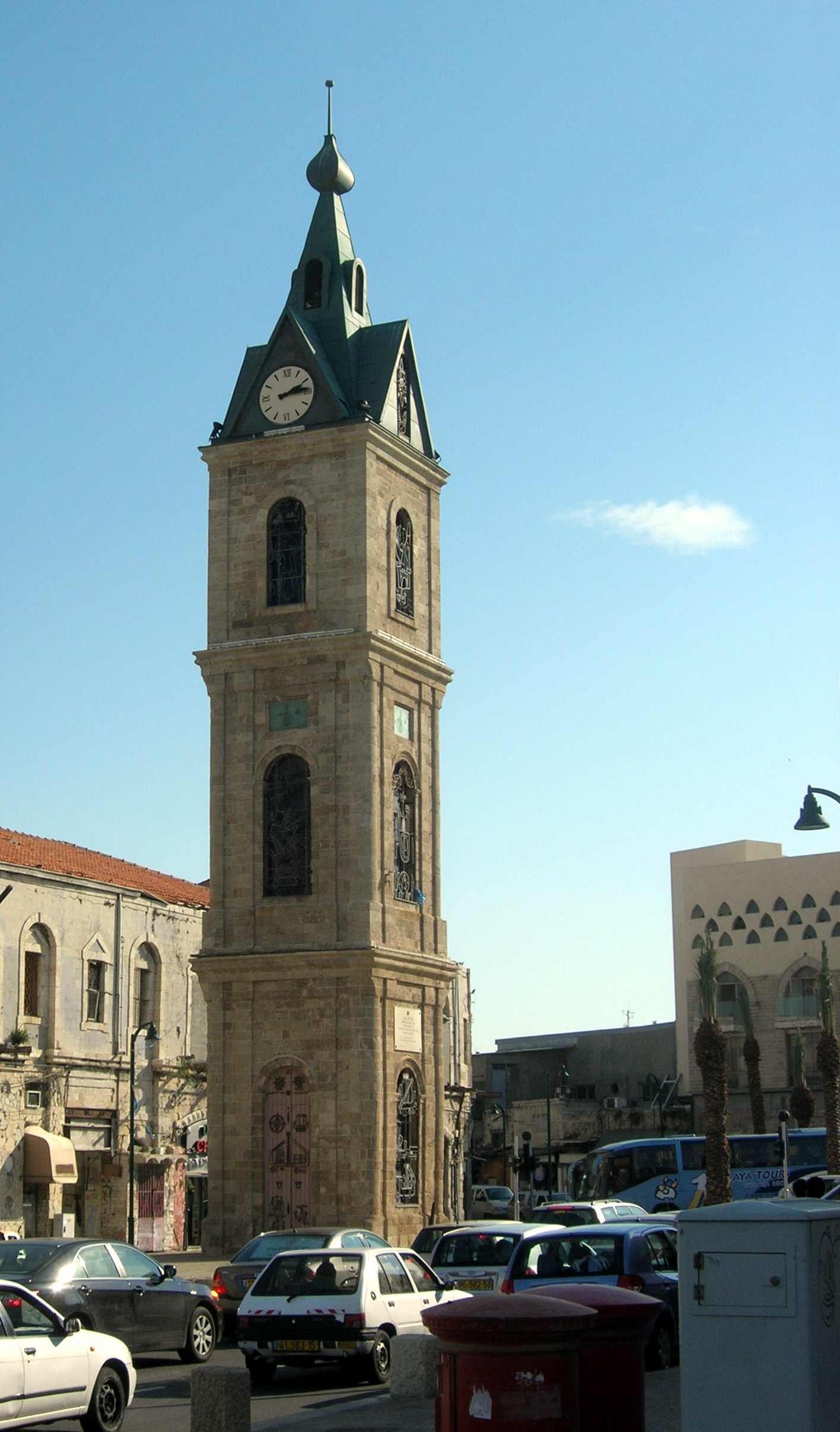 Tour de l'horloge à Jaffa